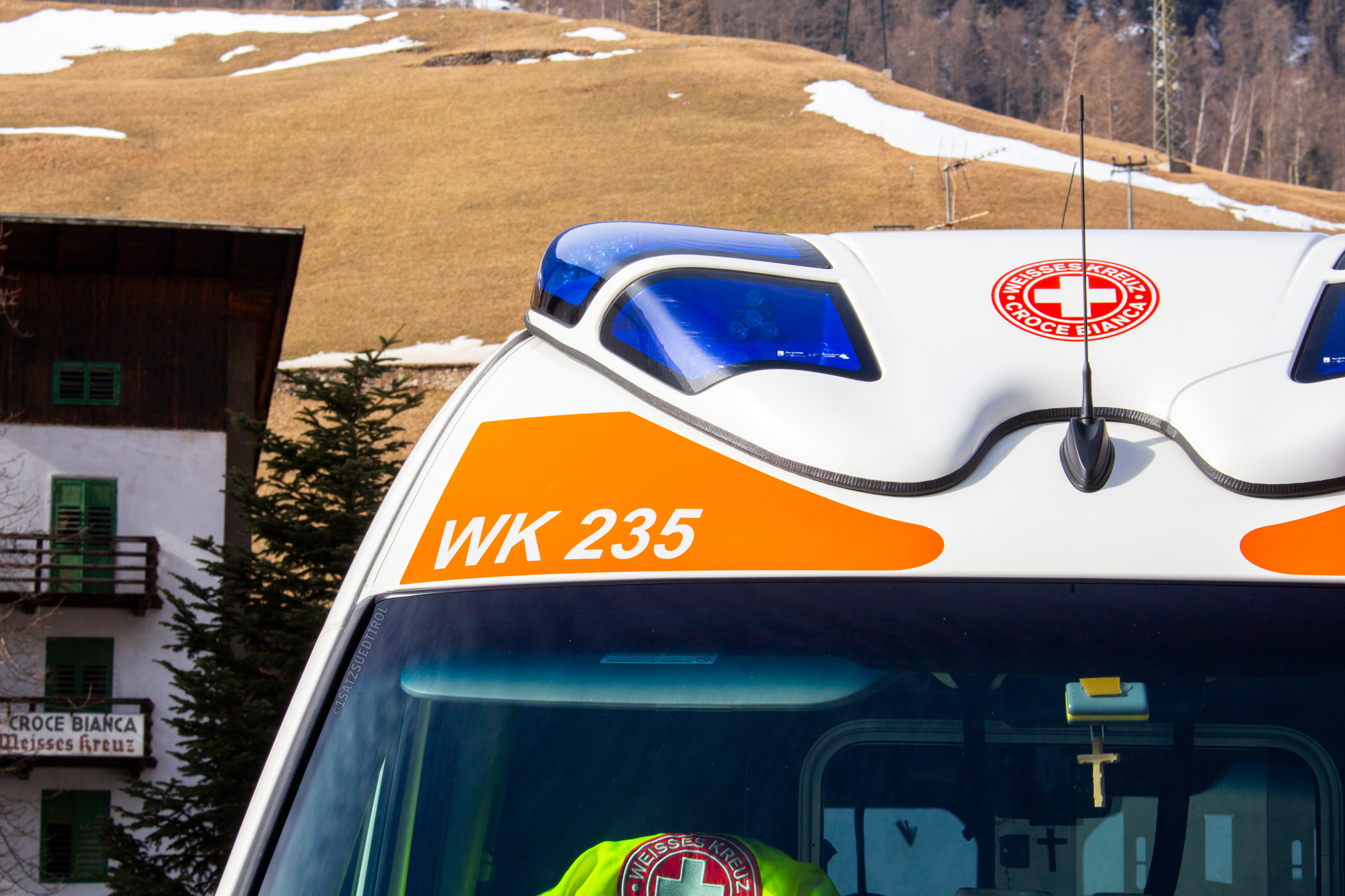 Funkrufname Weißes Kreuz 235